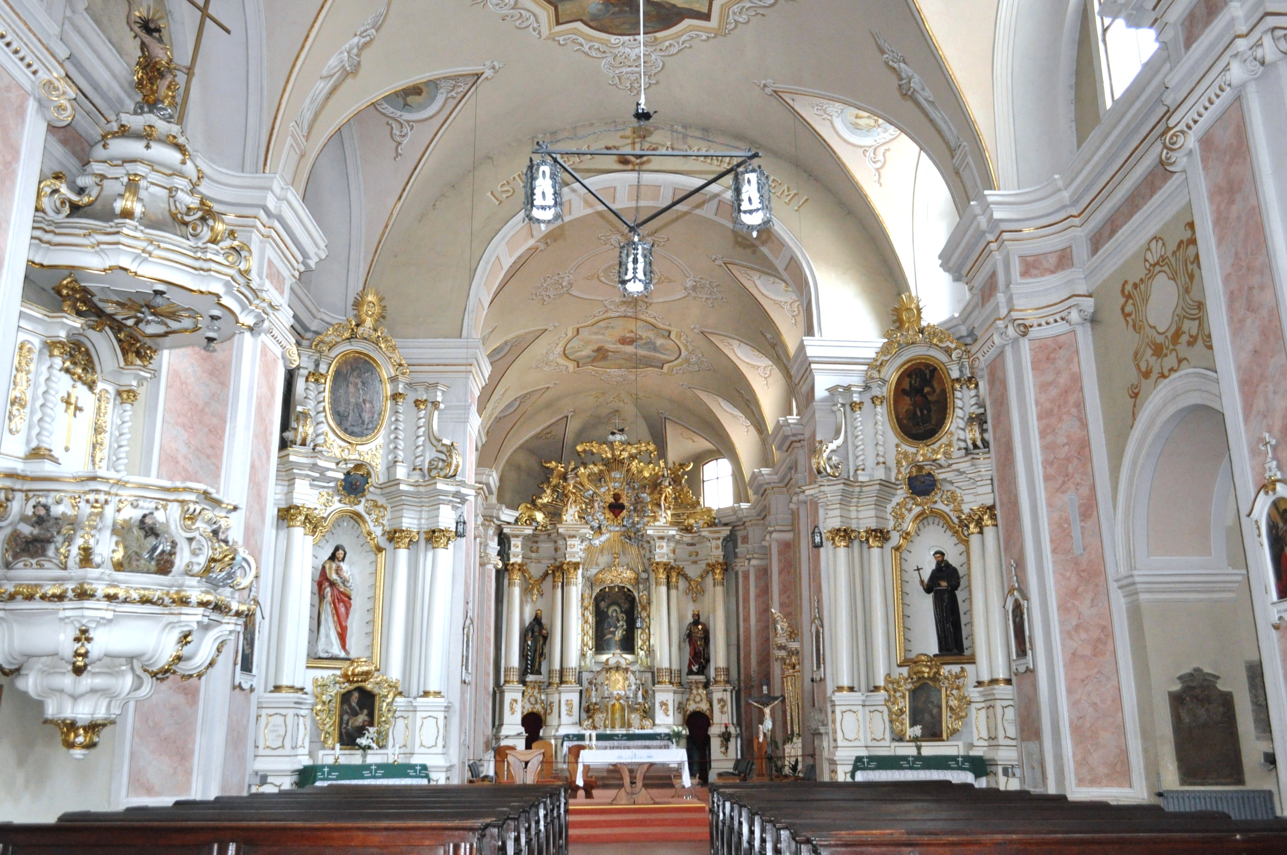 Biserica Franciscană din Cluj 01